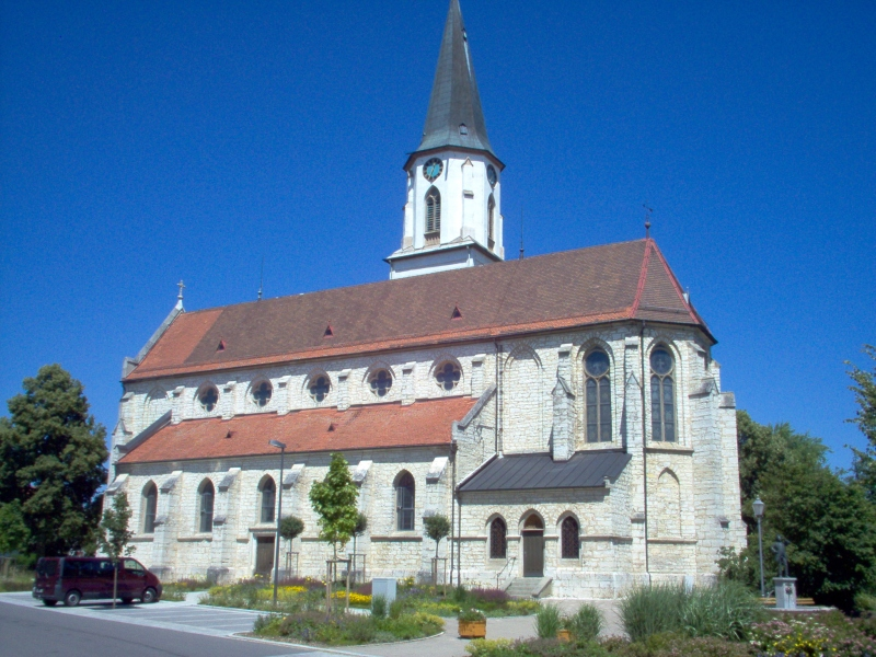 Pfarrkirche St. Martin Inneringen, Gemeinde Hettingen